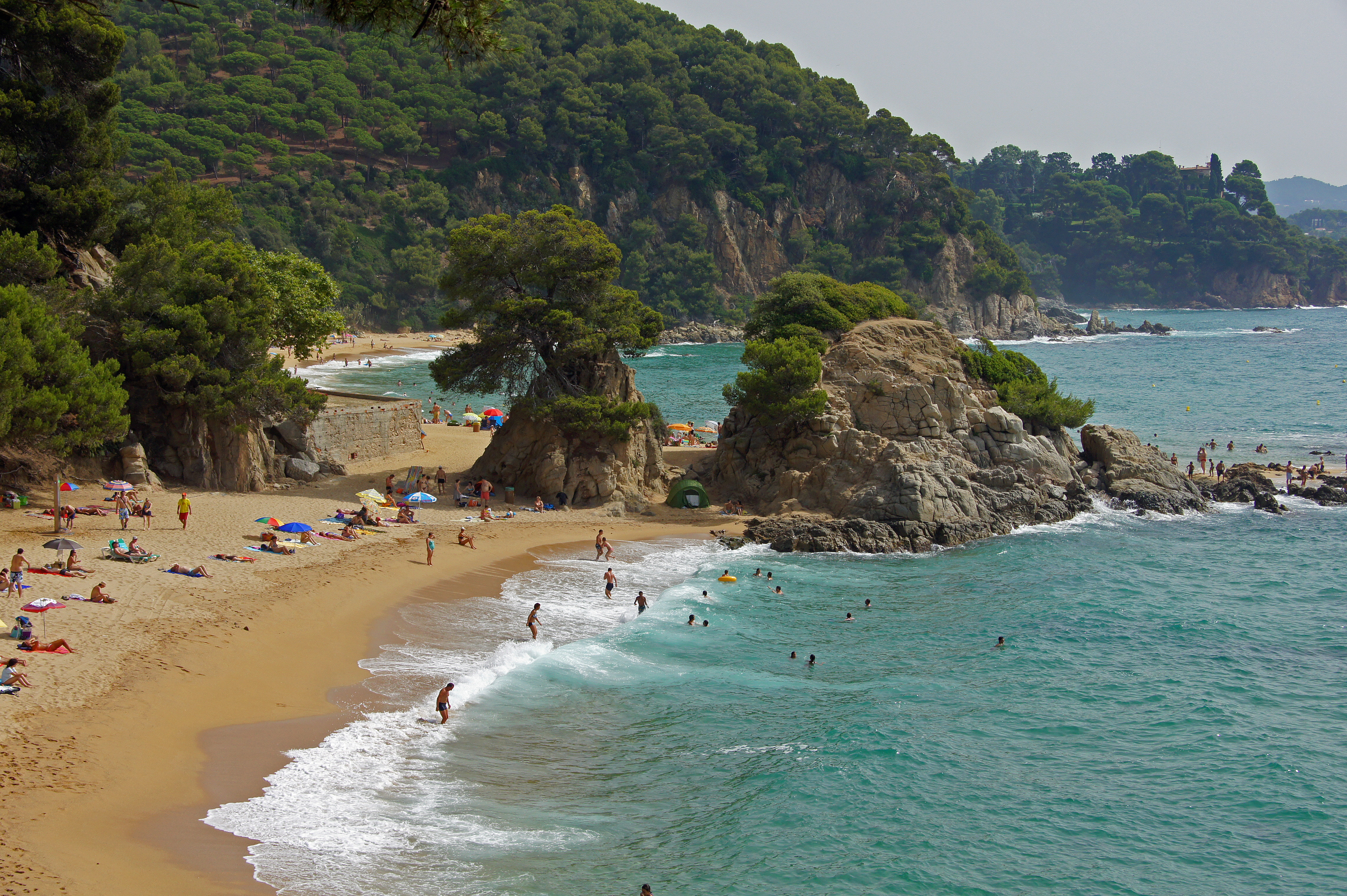 Strand Santa Cristina südlich von Lloret de Mar; im Hintergrund liegt der Strand Treumal